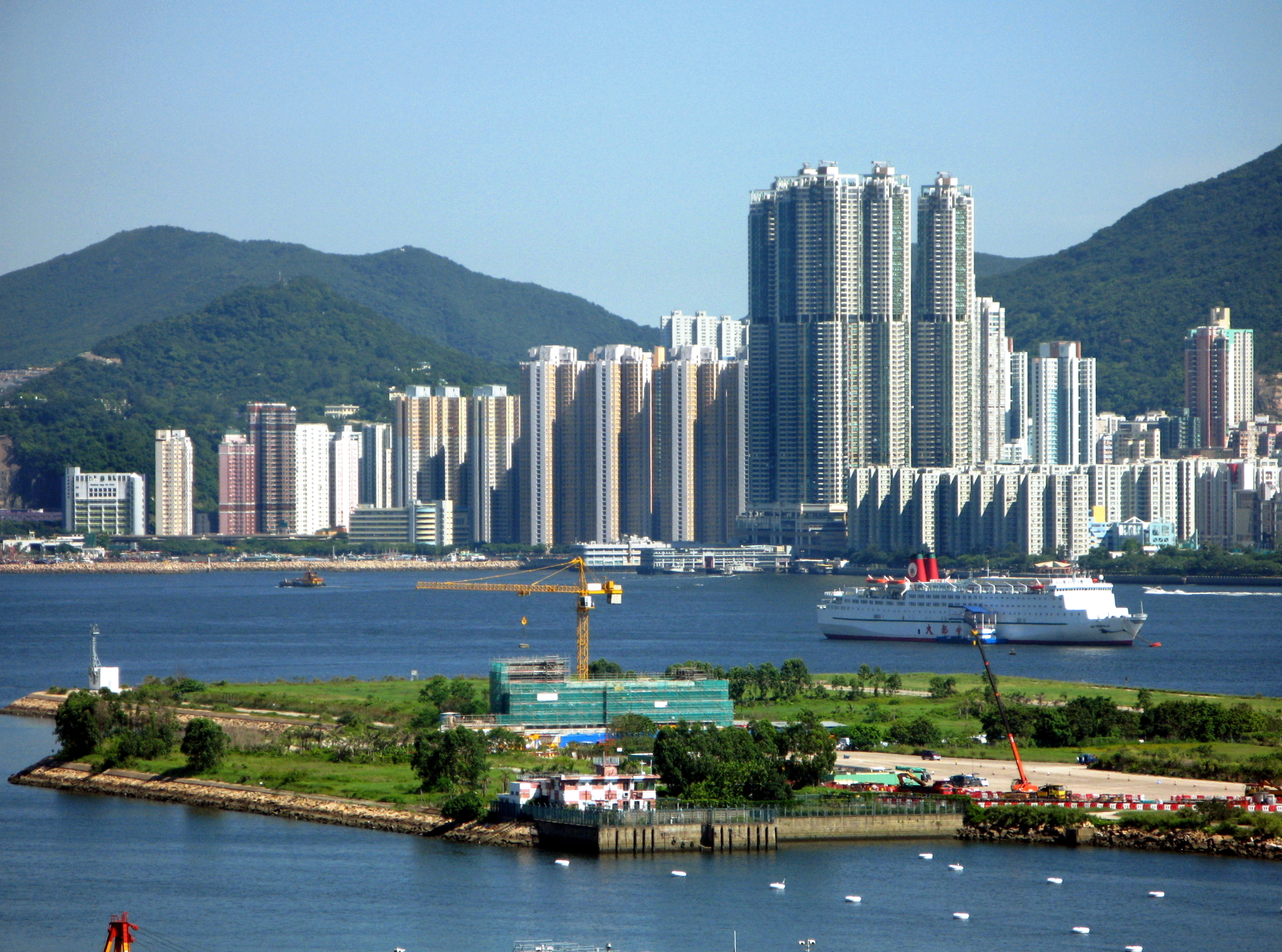 Sai Wan Ho, Hong KONG 西灣河